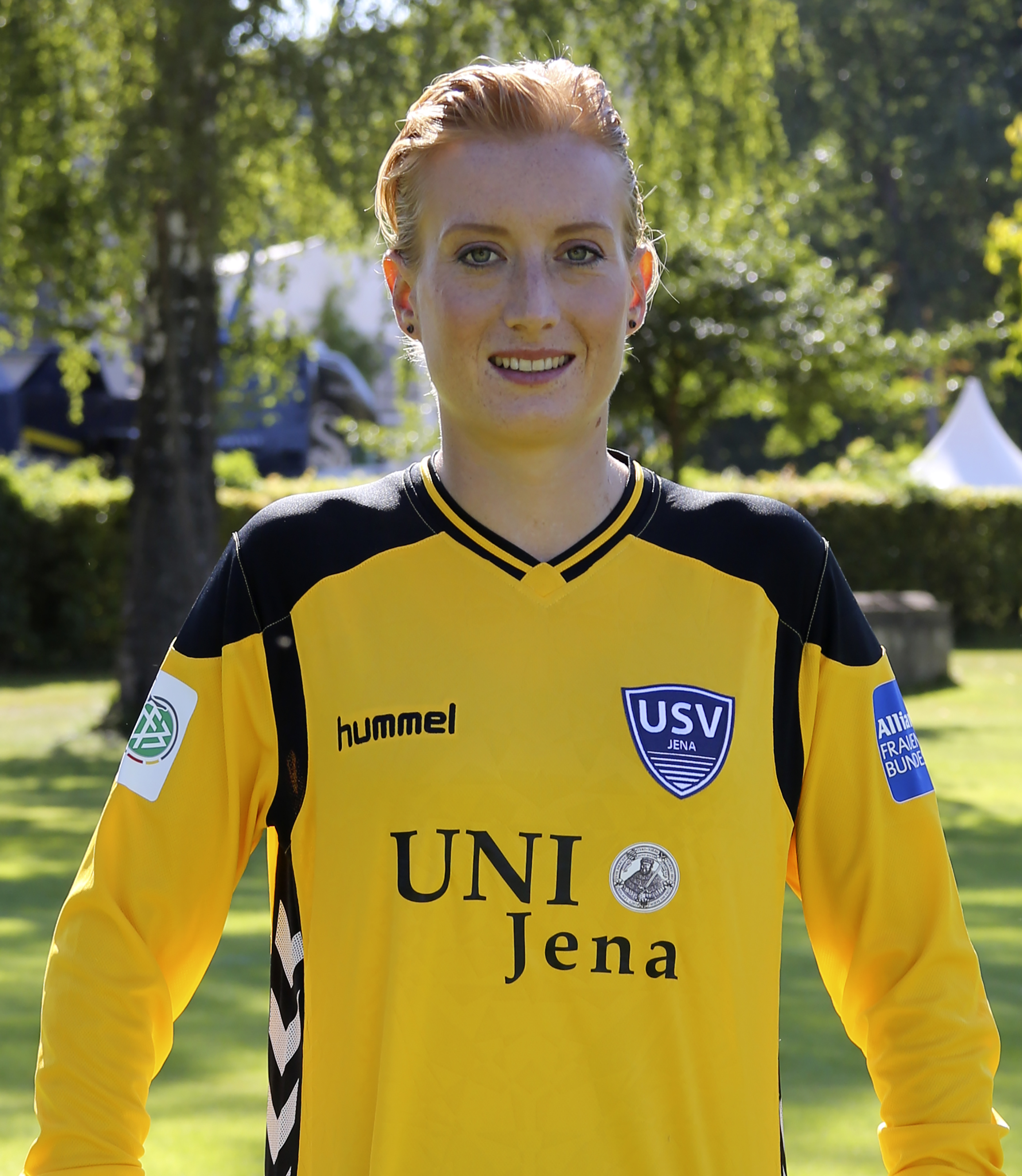 Mannschaftsvorstellung FF USV Jena 2016 / 17